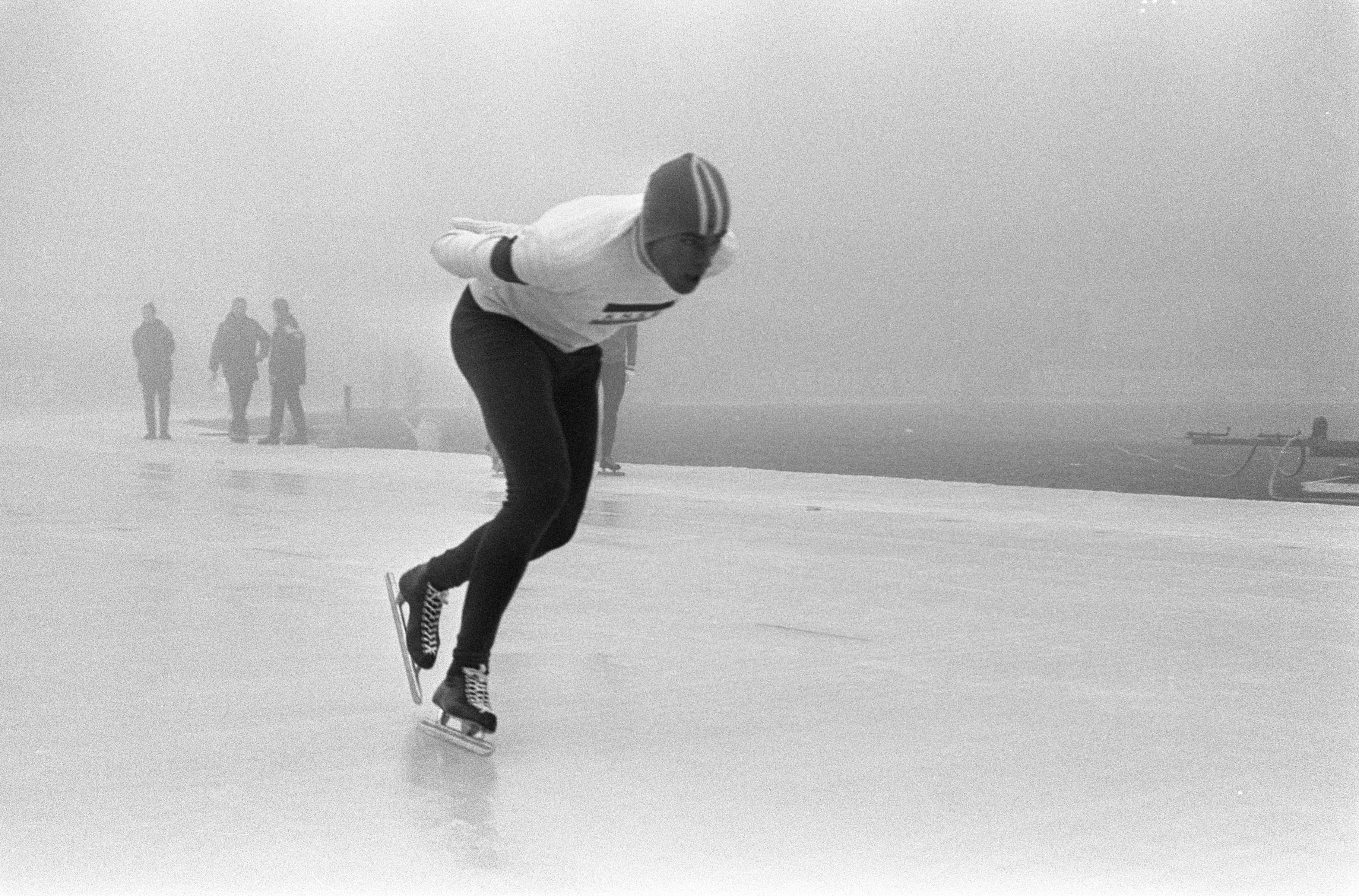 Nederlands Schaatskampioenschappen te Deventer, Ard Schenk. 27 december 1965